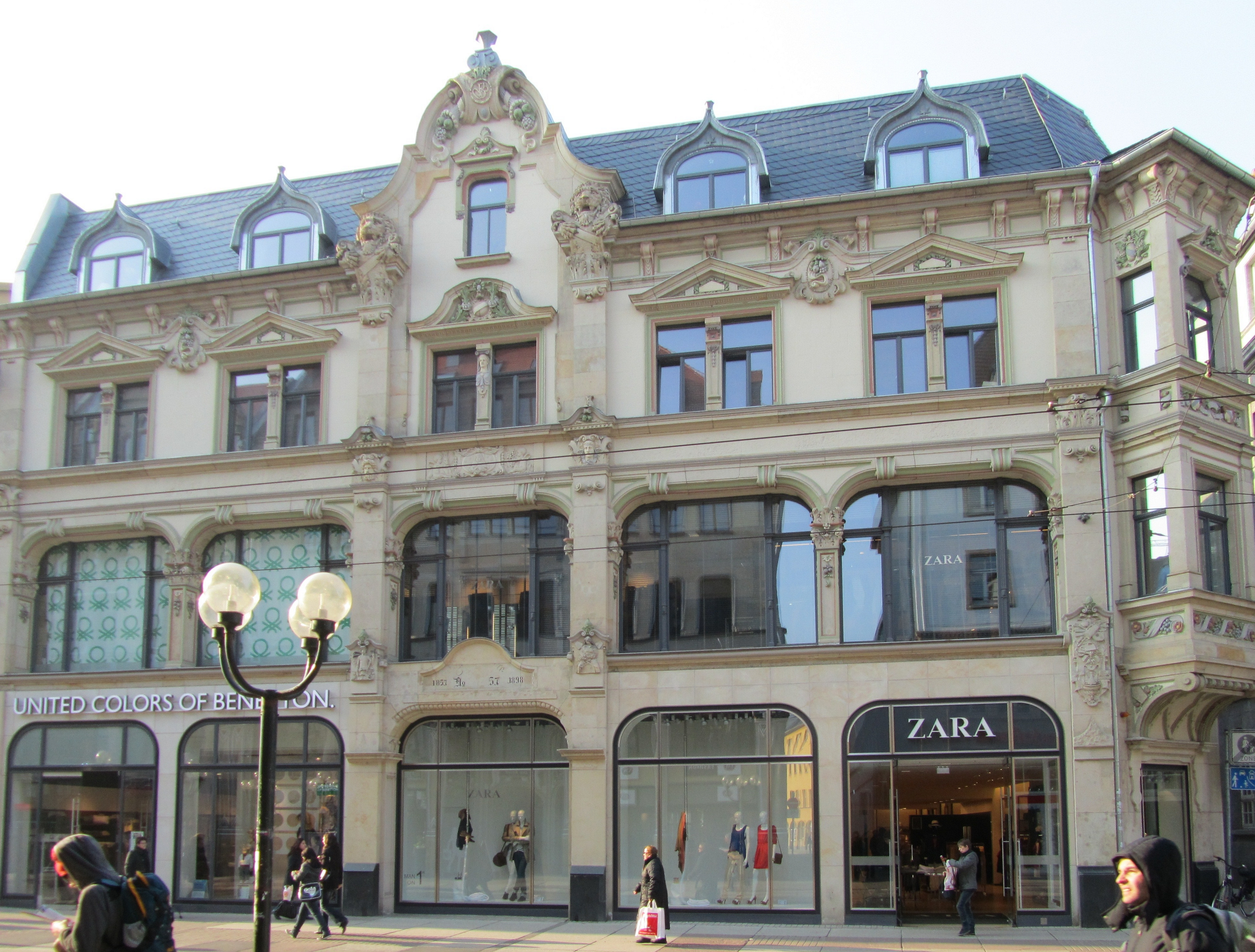 Das Geschäftshaus am Anger 57 in Erfurt. Hier befand sich im hinteren Teil des Gebäudes das Kino "Filmtheater am Anger" (Schließung im Jahr 2001), welches im Zuge der Umbau- und Sanierungsarbeiten im Jahr 2006 abgebrochen wurde.